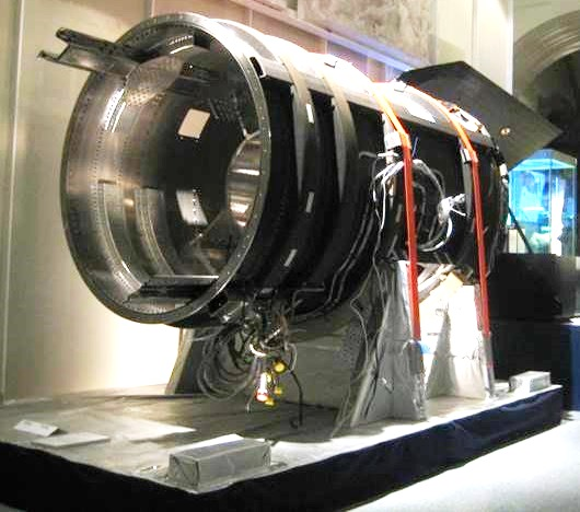 ORFEUS-Teleskop für den deutschem Satelliten ASTRO-SPAS (NASA-Projekt 1993/1996), Astrophysikalische Sammlung der Universität Tübingen